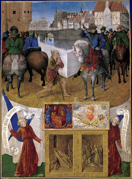 La charité de saint Martin Heures d'Étienne Chevalier, enluminées par Jean Fouquet Paris, musée du Louvre, département des Miniatures et Enluminures, RF 1679, Photo RMN Fouquet a replacé l'histoire de saint Martin dans un contexte parisien, à l'entrée du Grand Châtelet. Tandis que ses compagnons pénètrent déjà sous la voûte, Martin remet son épée au fourreau après avoir coupé son manteau en deux, vêtant le pauvre de la moitié qui lui appartenait. Au-dessous, dans la lettre O, le Christ, s'identifiant au pauvre, apparaît en songe à Martin. Deux autres épisodes de la vie du saint sont évoqués dans les panneaux du bas : sa chute provoquée par le démon et la visite de la Vierge, de sainte Agnès et de sainte Thècle.